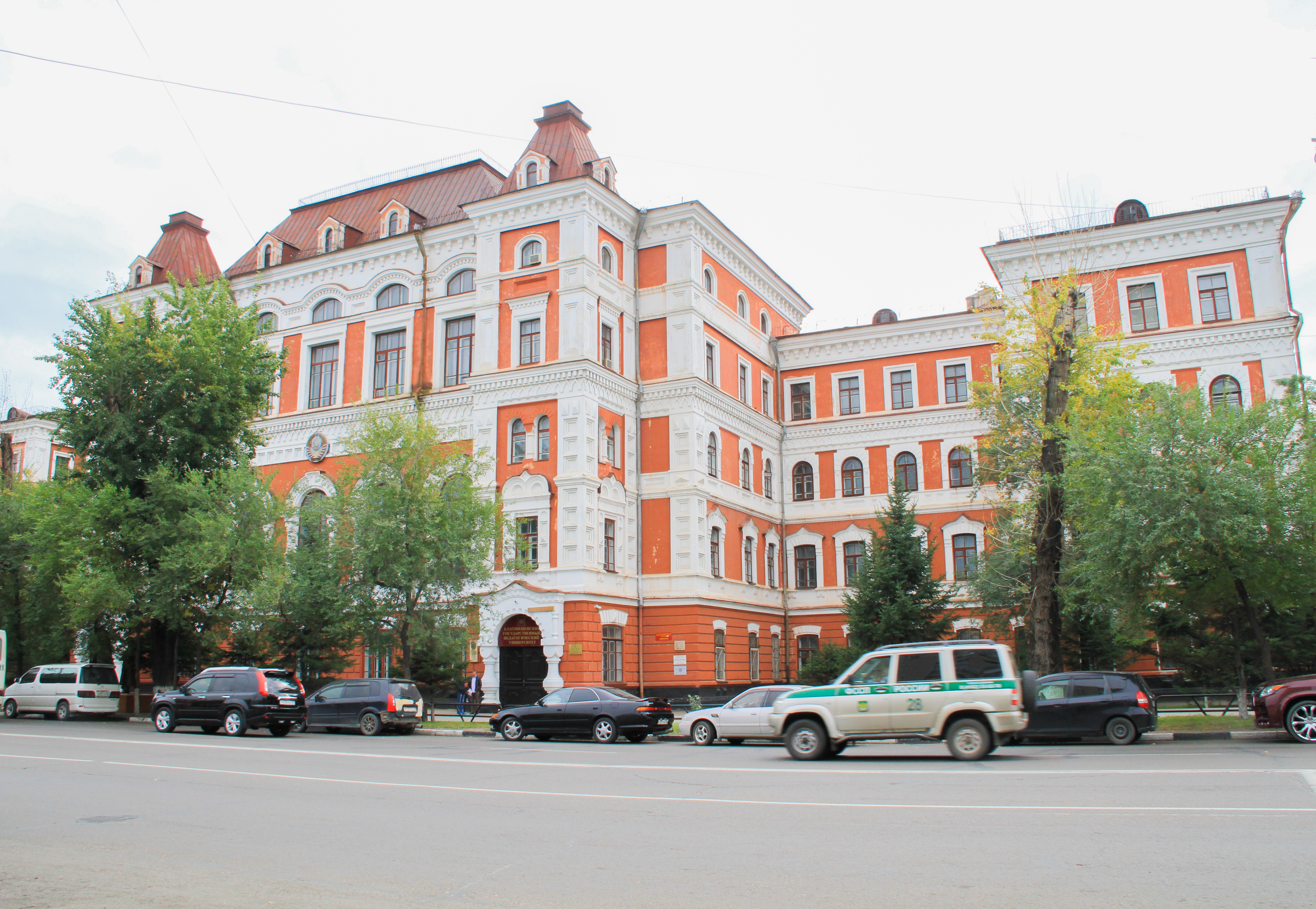 Здание: улица Ленина, 104, Благовещенск, Амурская область